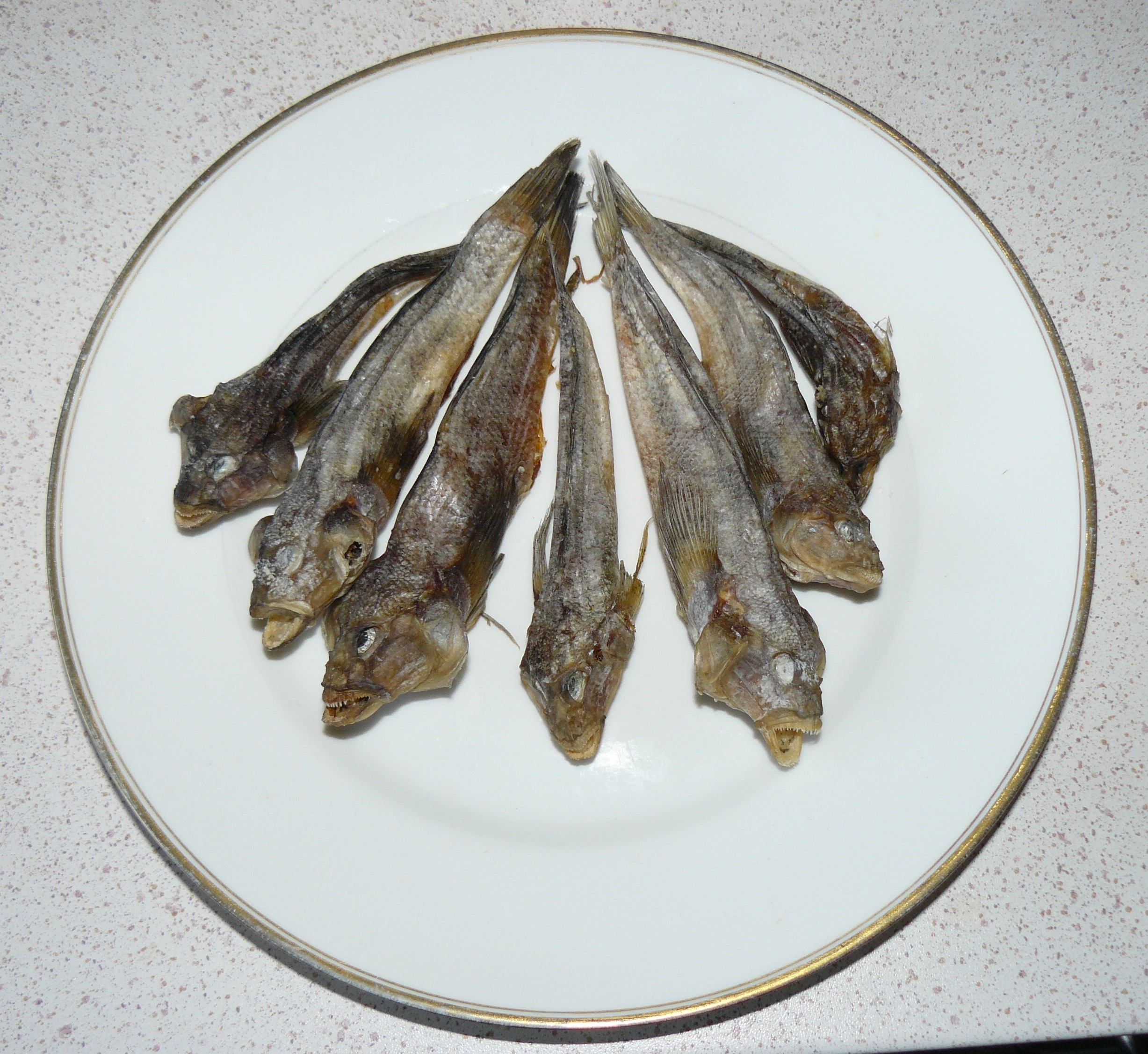 "Бички в'ялені" (Bytchky v'ialeni) : Gobies séchés, commercialisés en Ukraine comme amuse-gueule. Origine : Mer d'Azov, Mer Noire.